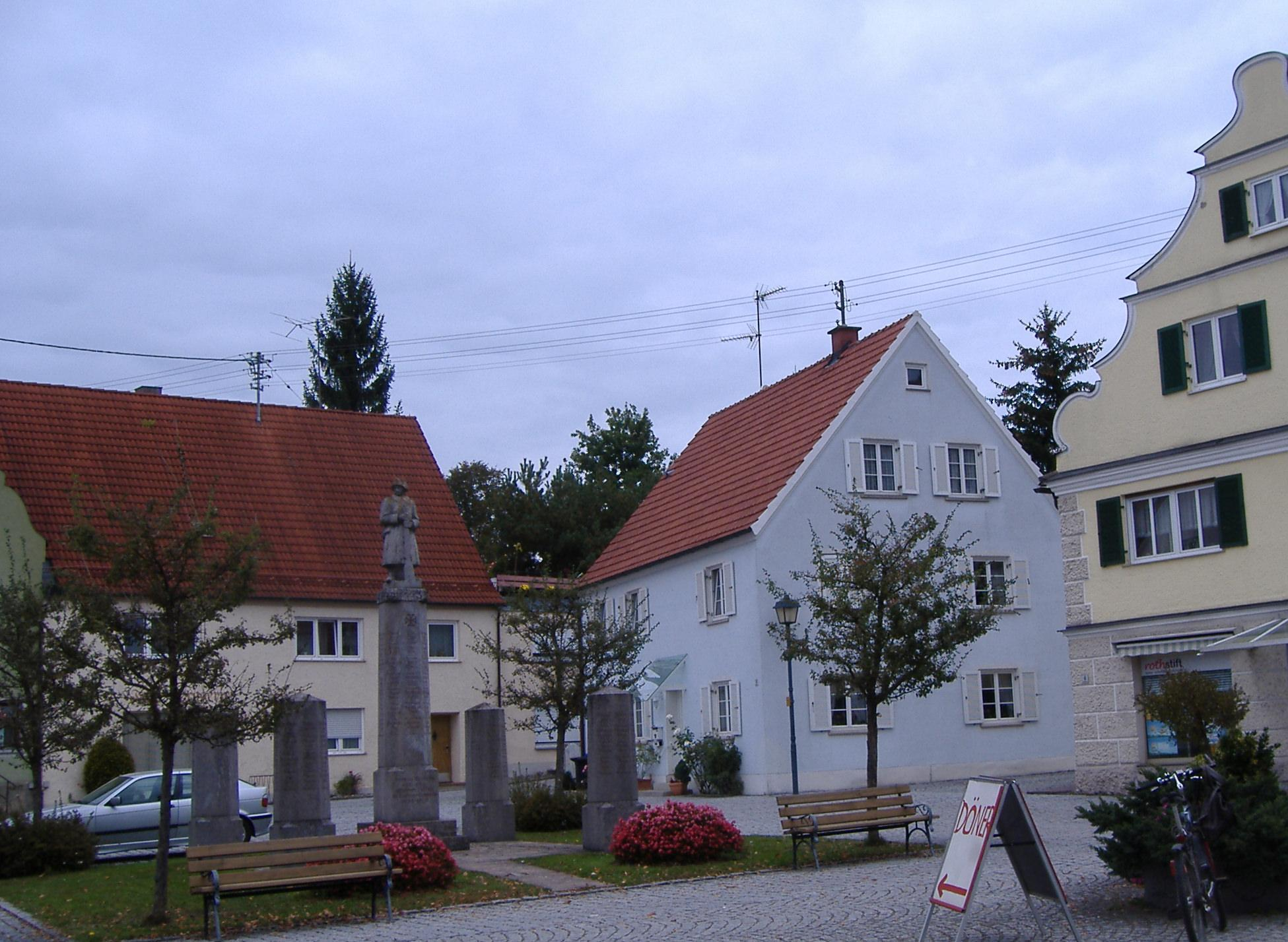 Buttenwiesen